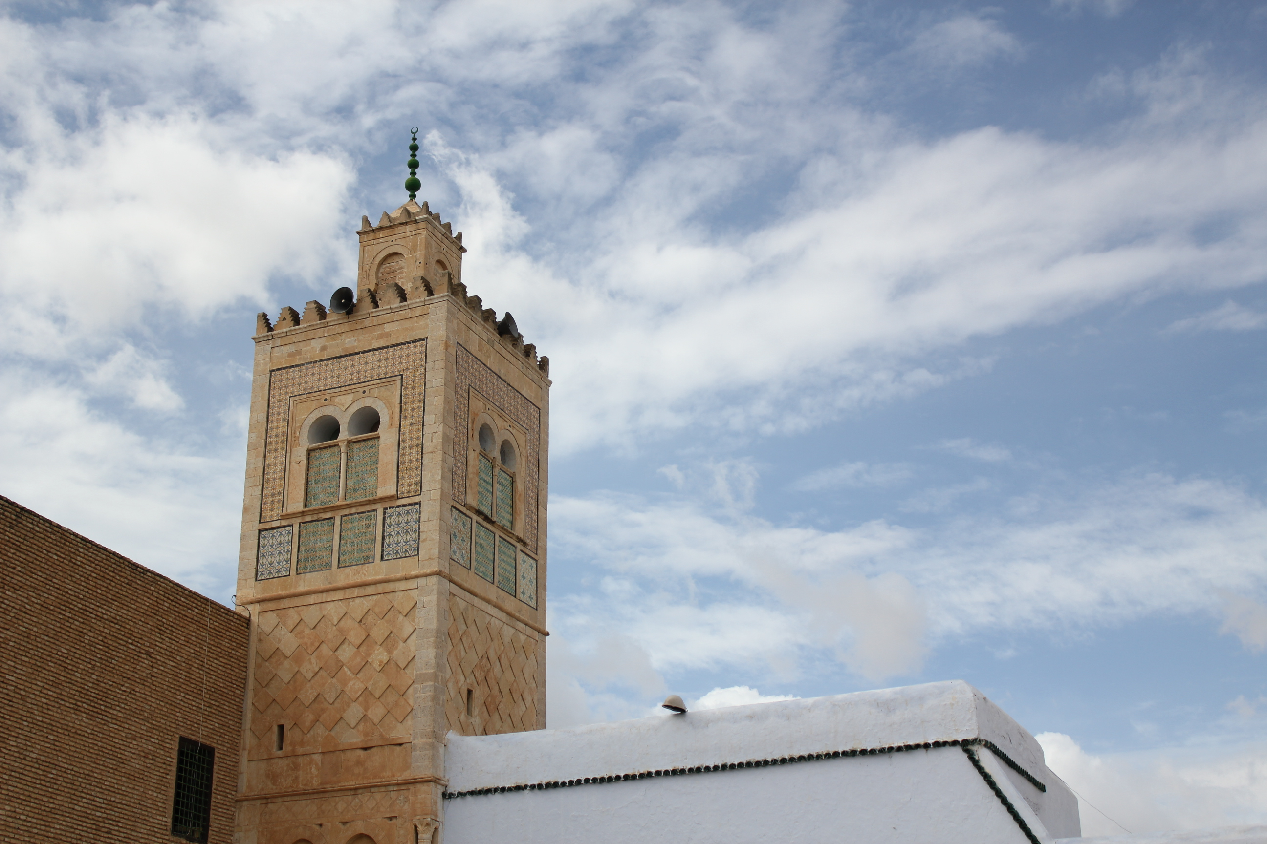 Vue de la partie supérieure du minaret dans le complexe de la mosquée du Barbier qui est également connue sous le nom de mausolée de Sidi Sahab, à Kairouan, en Tunisie.